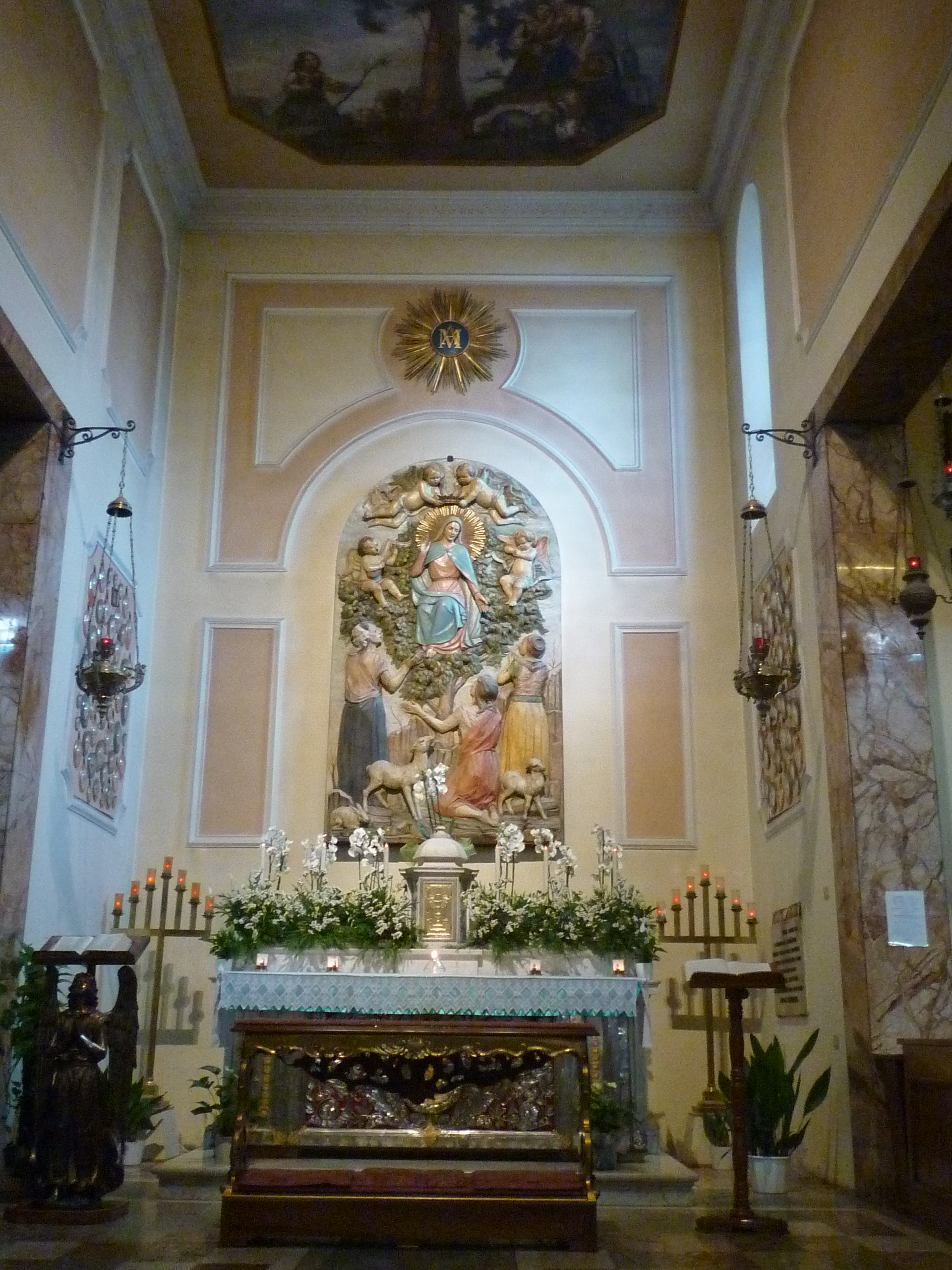 Cappella eretta sul luogo attribuito alla apparizione di S. Maria dell'Olmo a Thiene, situata all'interno della Chiesa omonima